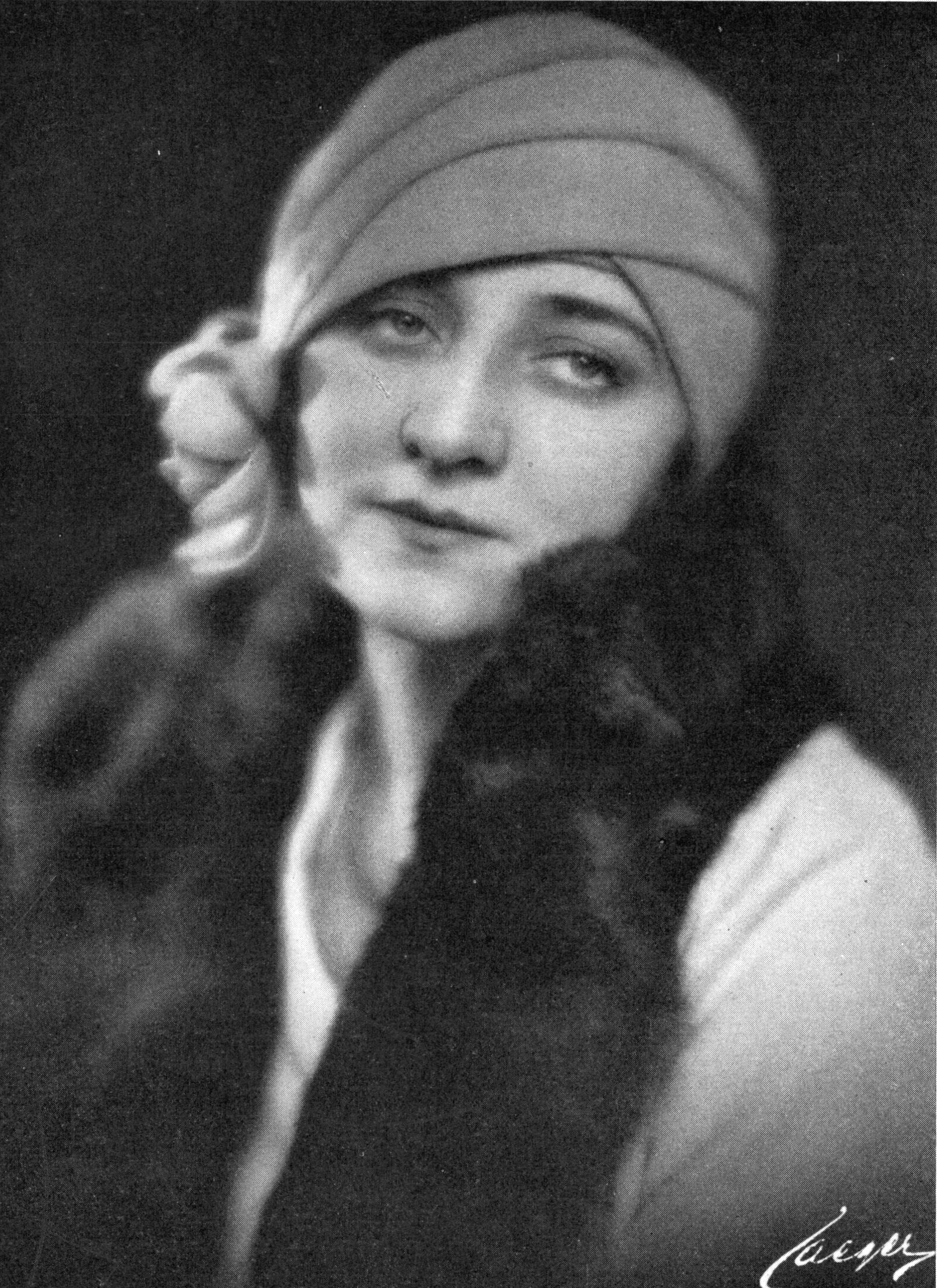 Alice Eklund (1896-1983) Scenen 1928.